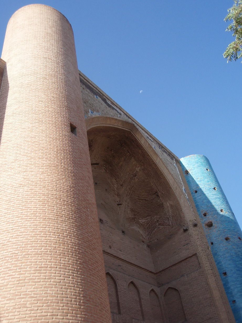 Shahab-al-Din Ahari's Tomb, Iran, Ahar.